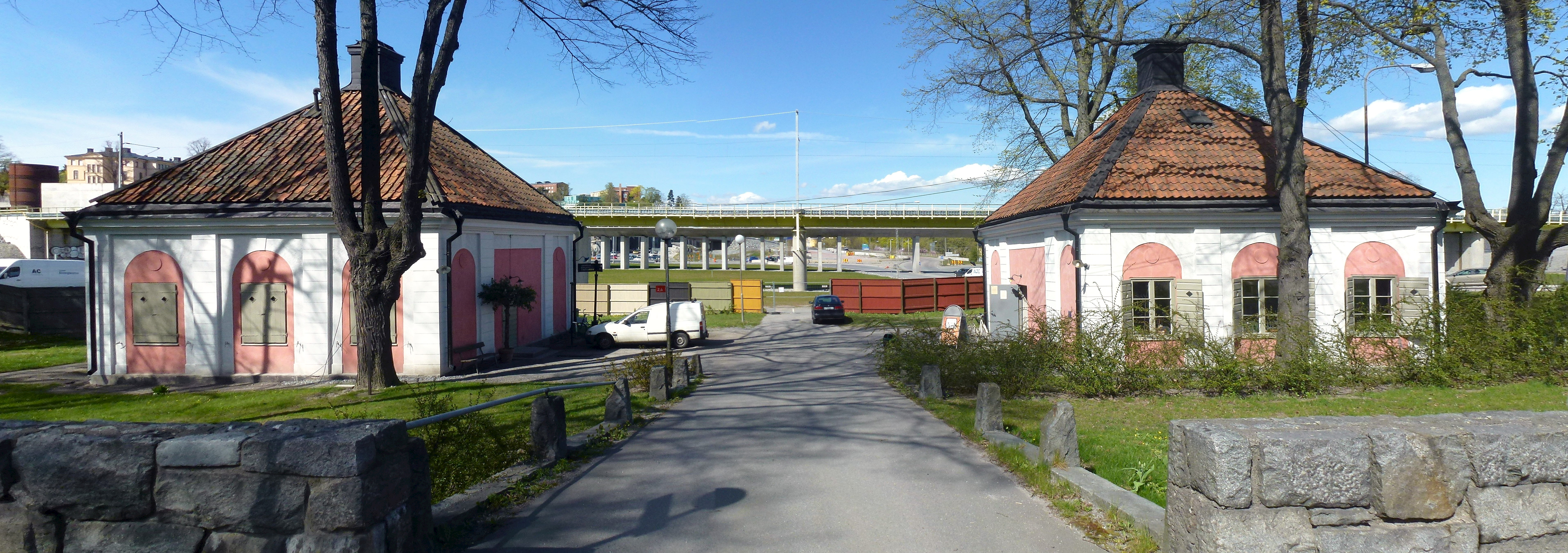 Norrtulls tullstugor